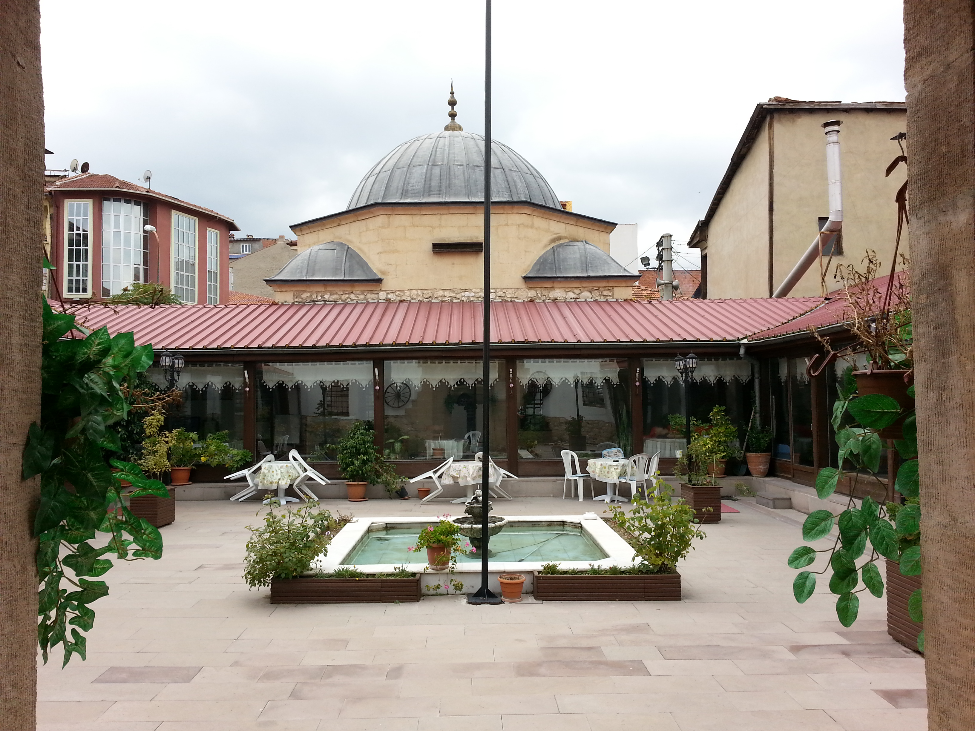 rüstem paşa medresesi